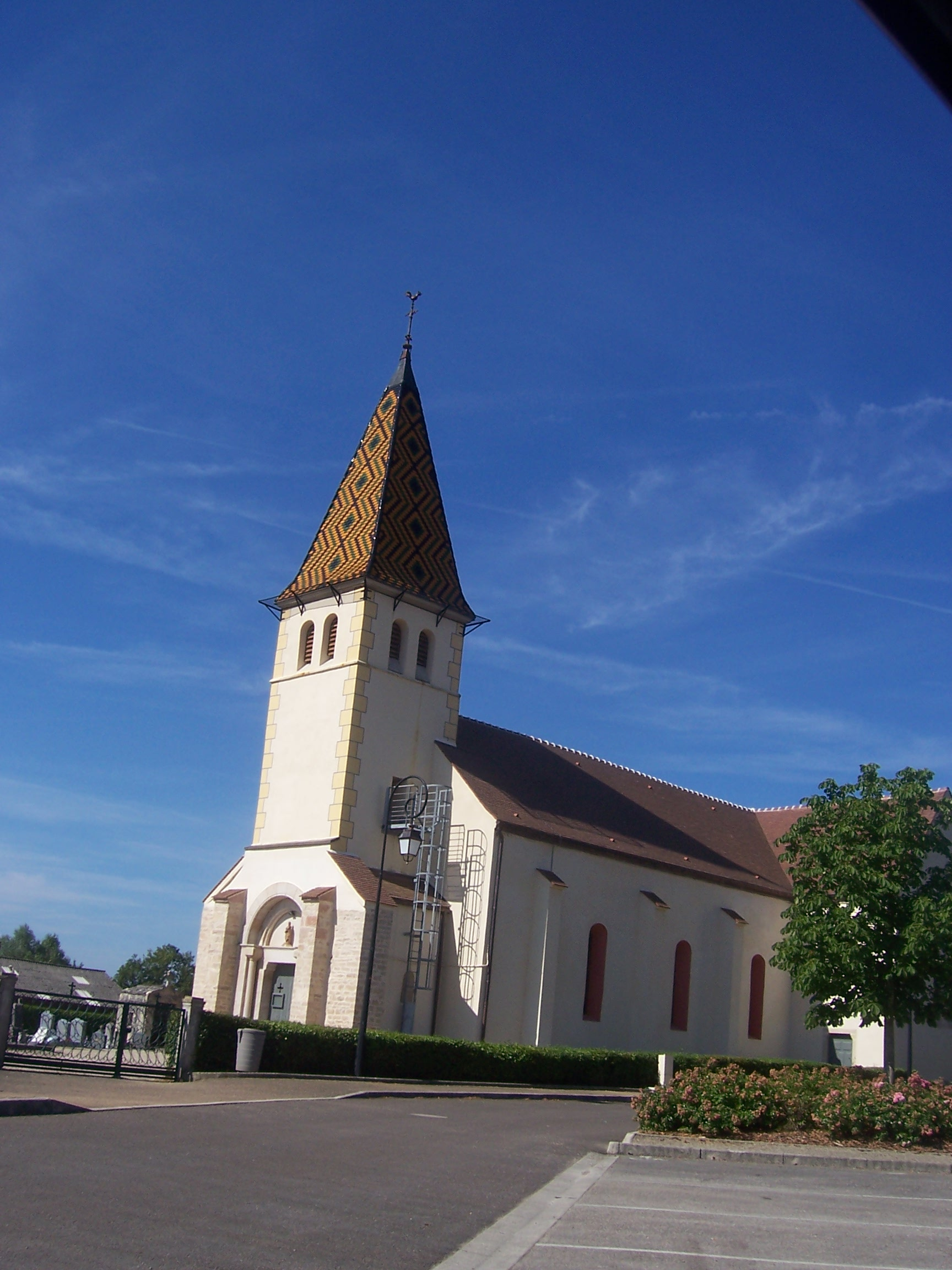 Eglise de Saint-Vincent-en-Bresse